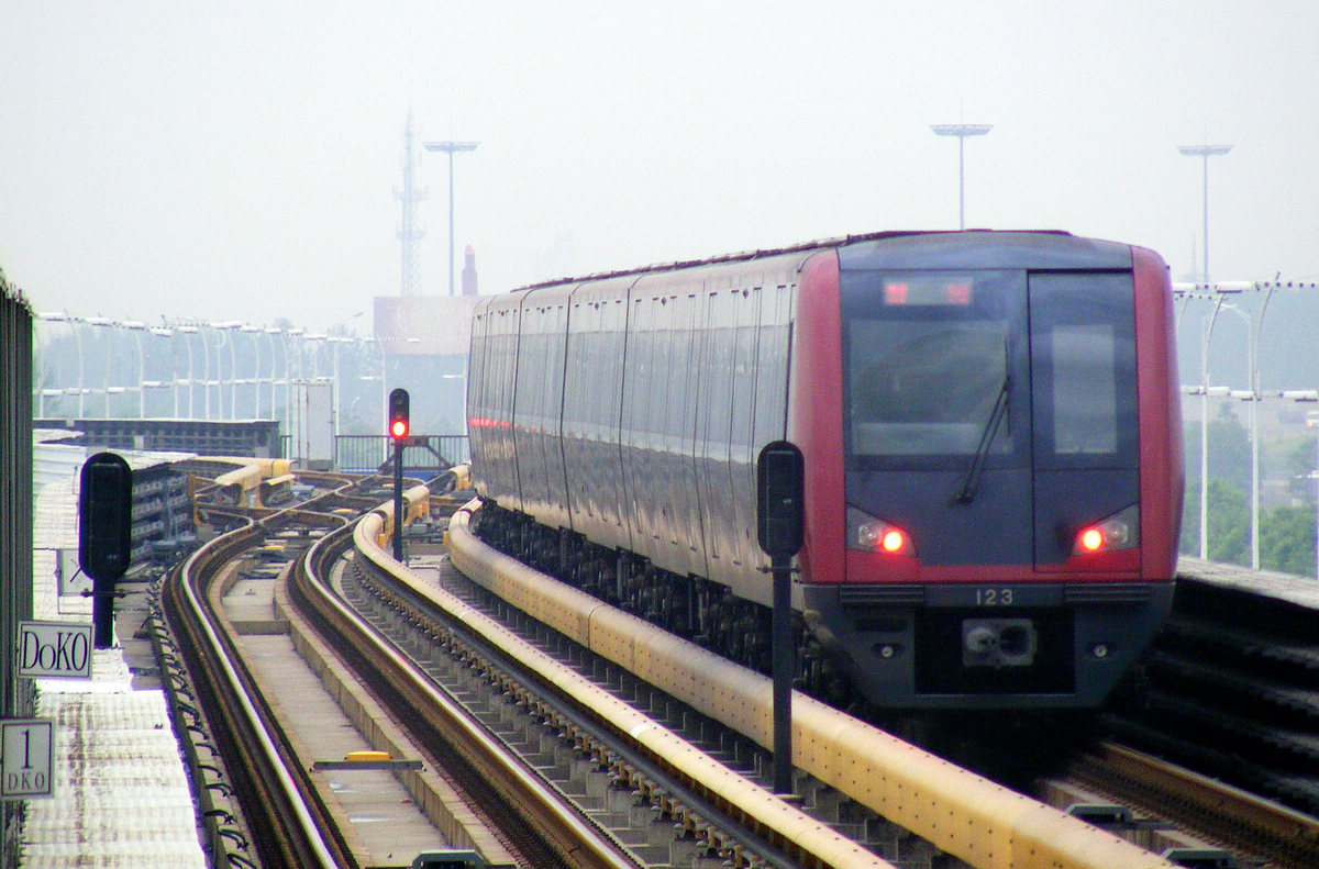 中文（中国大陆）: 一号线刘园站折返线